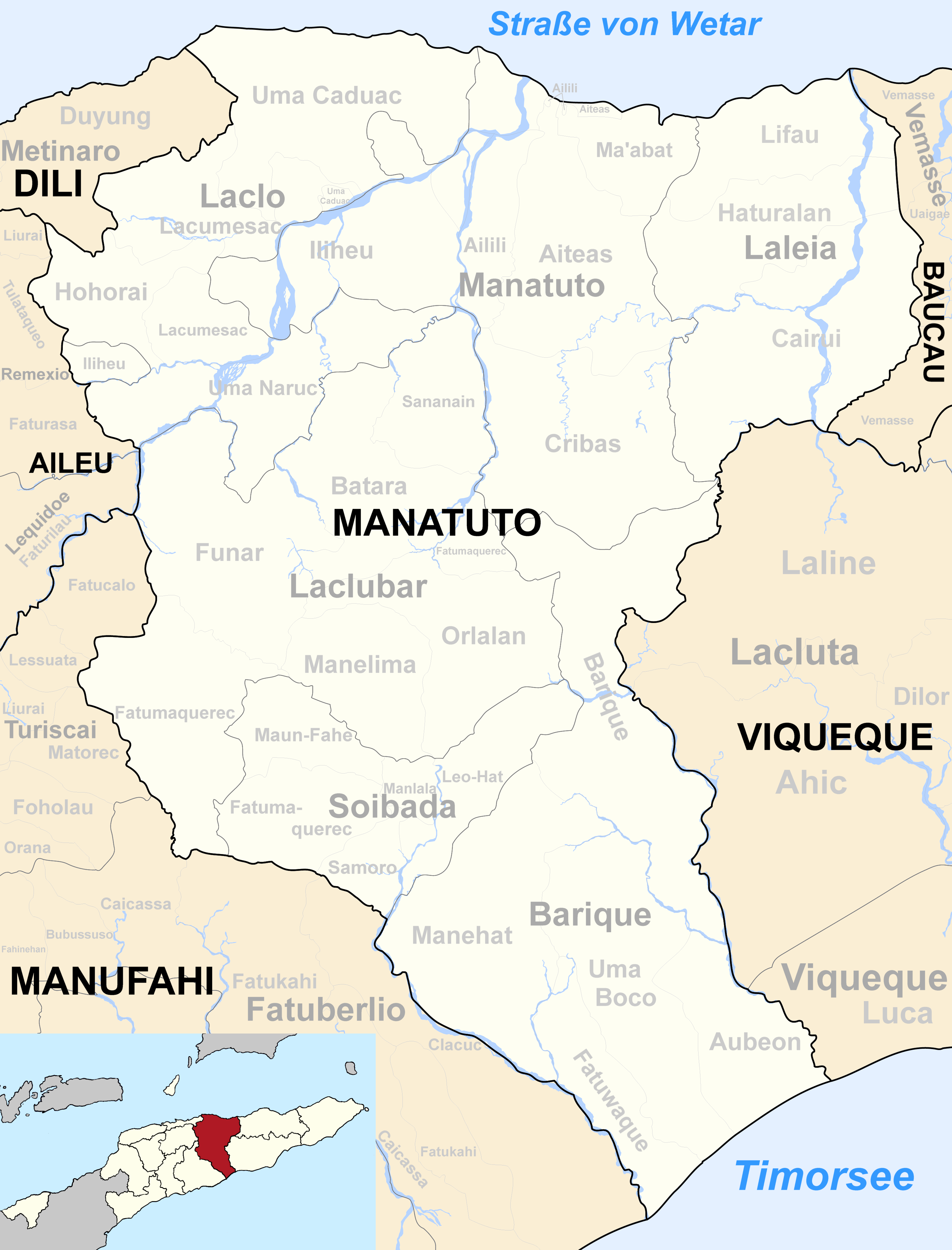 Verwaltungseinheiten der Gemeinde Manatuto, Osttimor.